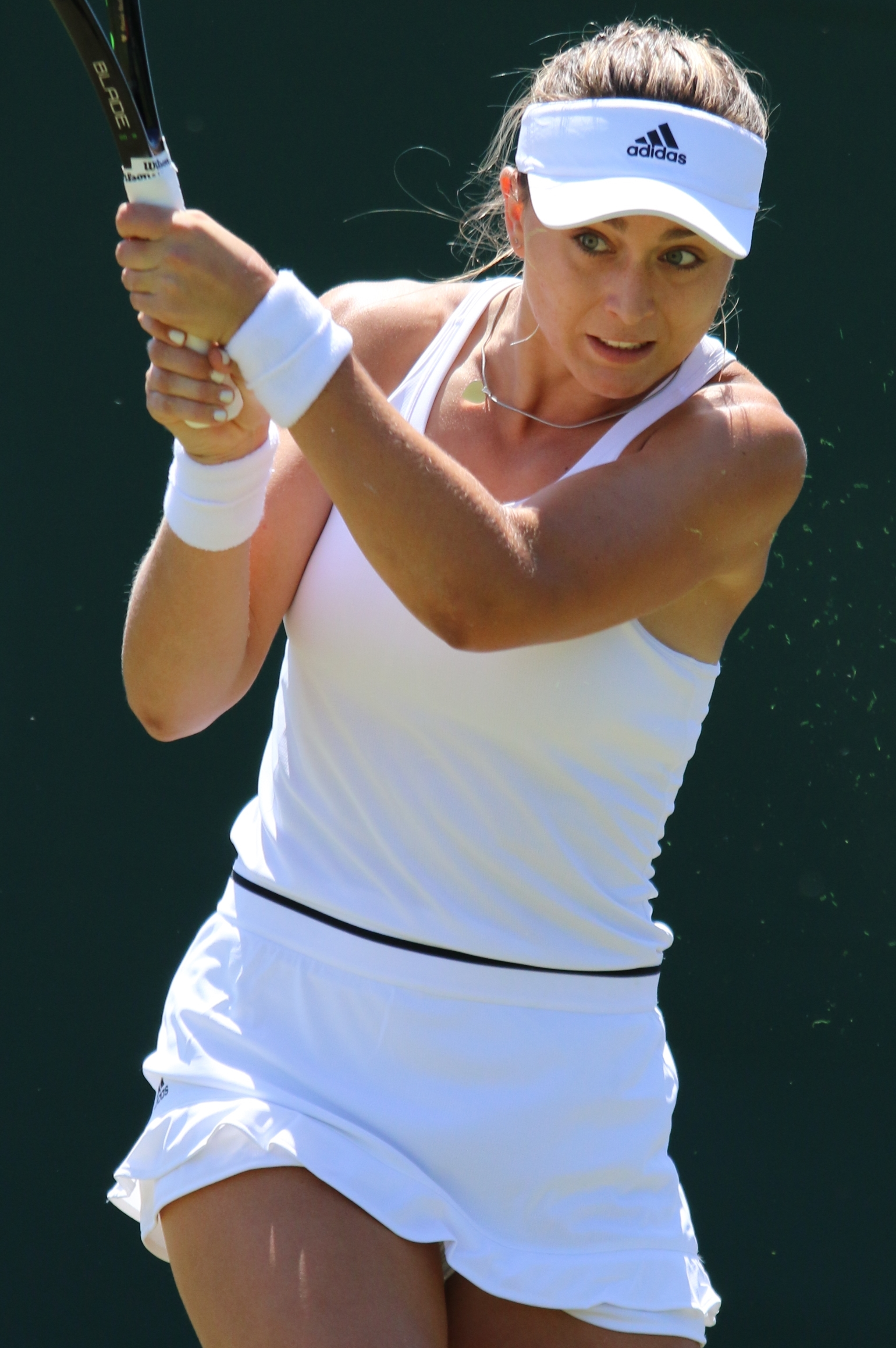 Badosa Gibert WMQ18 (34)